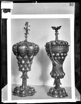 Rieti - Cattedrale di S. Maria Assunta, Museo del Tesoro, pissidi